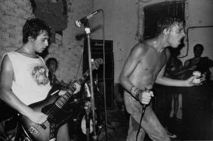 Cicatriz